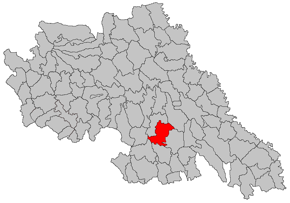 Categorie:Hărţi ale judeţului Iaşi